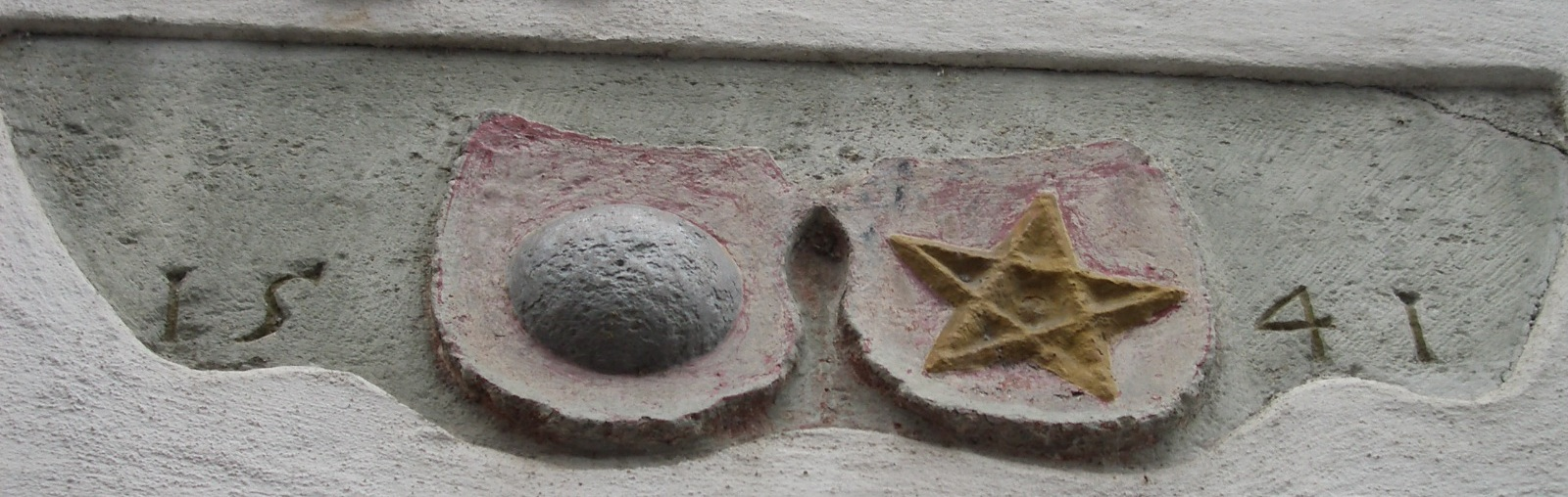 Mellingen AG, Switzerland self-made, August 2006